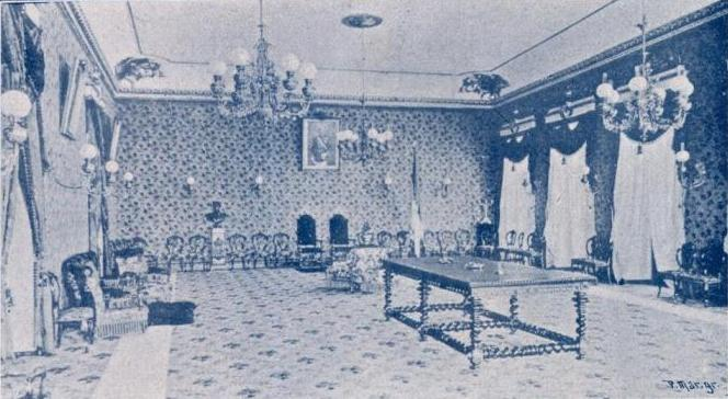 "Angra - Salão Nobre da Câmara Municipal", freguesia da Sé, concelho de Angra do Heroísmo, ilha Terceira, Açores, in Álbum Açoriano, fascículo nº 44, 1903, p. 346.